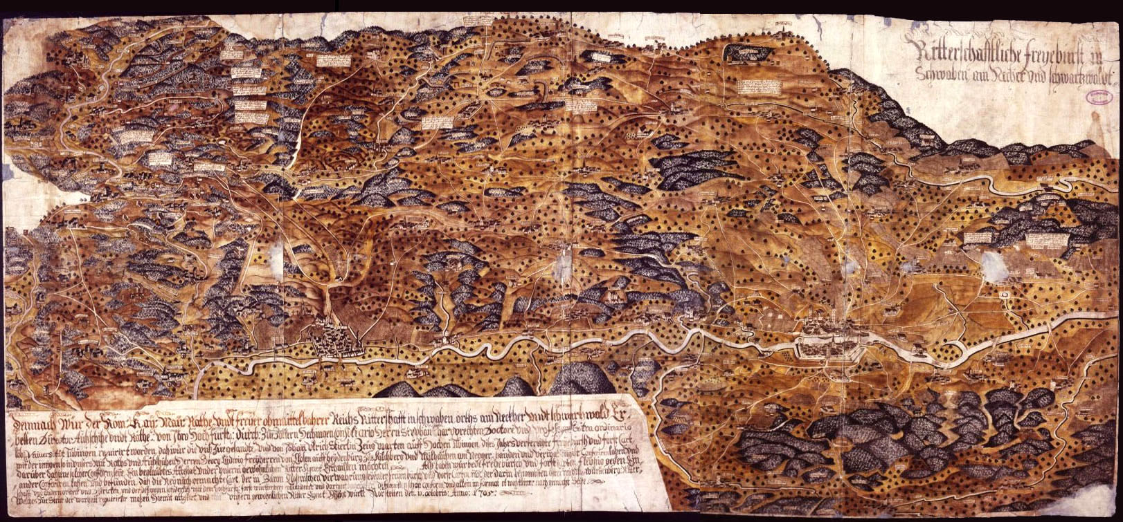 Die „Ritterschaftliche Freie Pürsch in Schwaben, am Neckar und im Schwarzwald", Kopie einer um 1605 entstandenen Karte der Ritterschaftlichen Freien Pürsch in Schwaben am Neckar und Schwarzwald aus dem Jahre 1705 (StAS K I Sch/1)